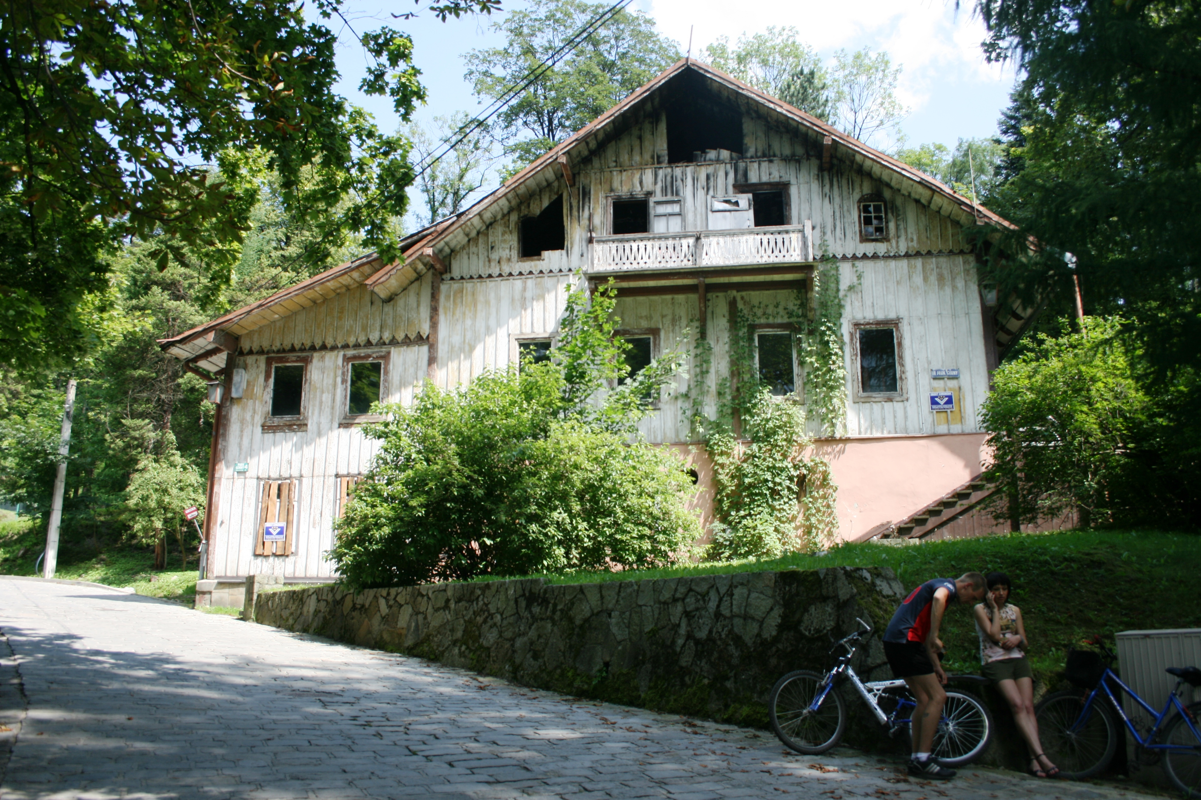 Szczawnica - Willa Alma w remoncie